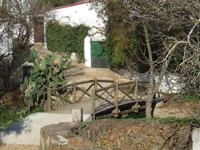 Este Puente está en La Codosera caserío del Marco,en el Río Abrilongo paso fronterizo entre España y Portugal 60,km al norte de Badajoz-España y a 45,km al sur de Portalegre-Portugal.